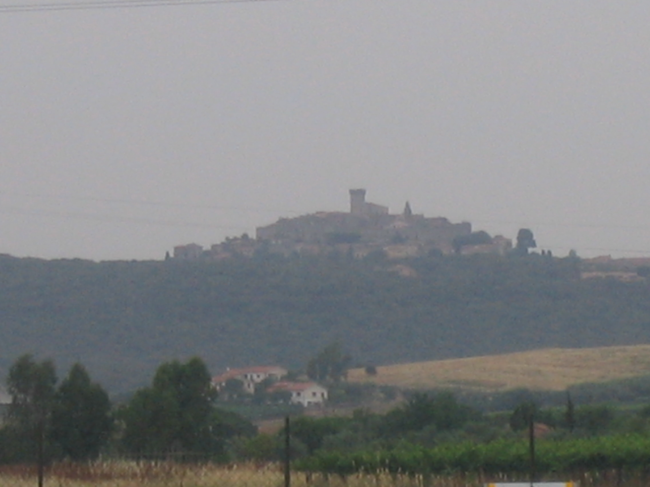 Capalbio, Toscana, Italia